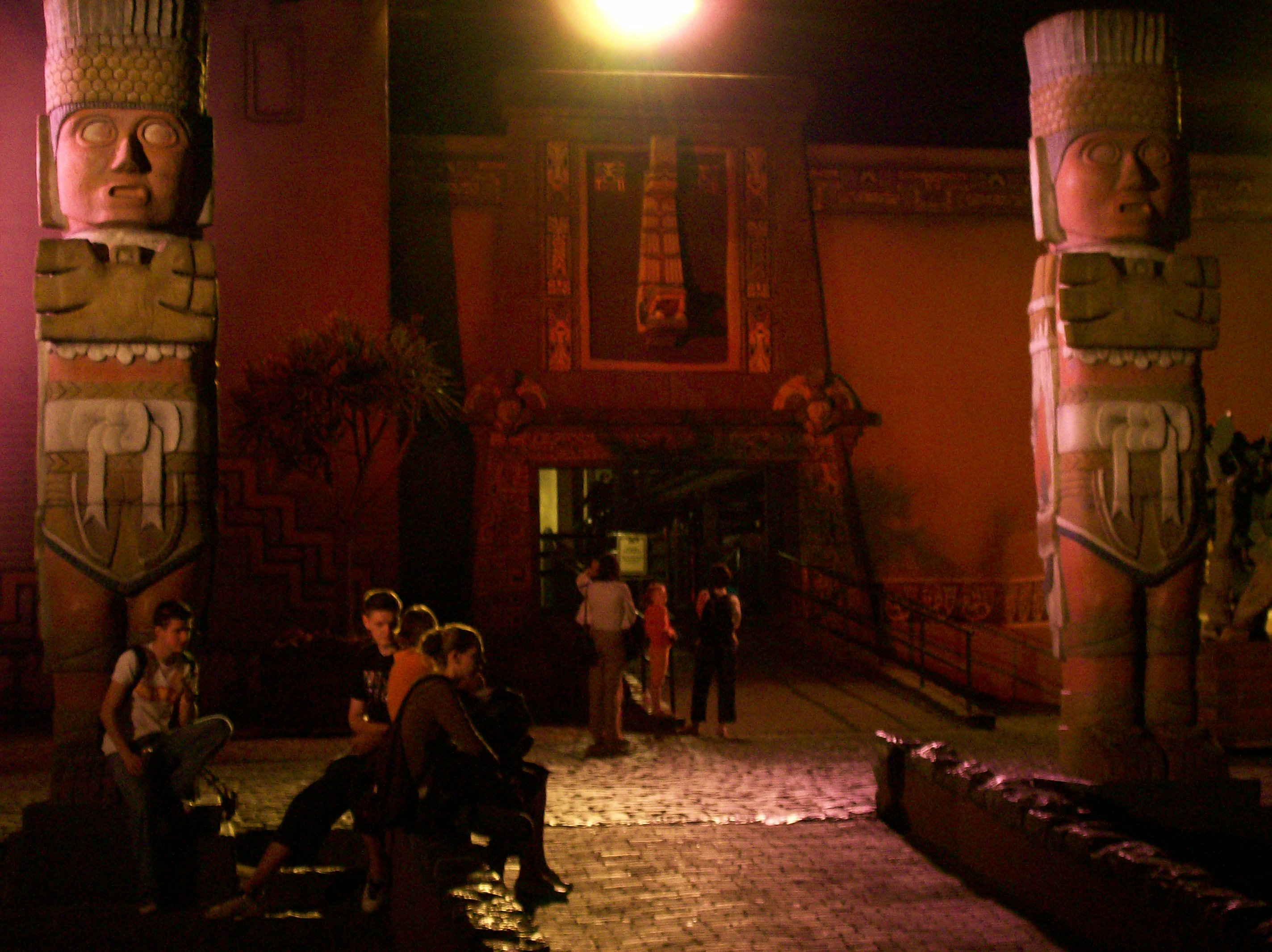 L'entrée de Piraña de nuit